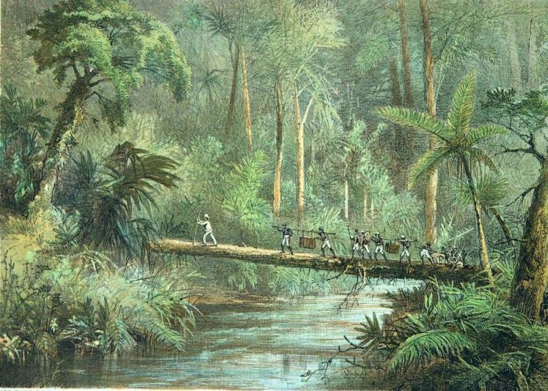 Litho. Carl Bock maakte in 1879 en 1880 een reis in Oost- en Zuid-Borneo, van Koetei naar Banjermasin. Over zijn ervaringen heeft hij een boek gemaakt.. Kleurenlitho getiteld "Overtocht over de rivier Benangan"